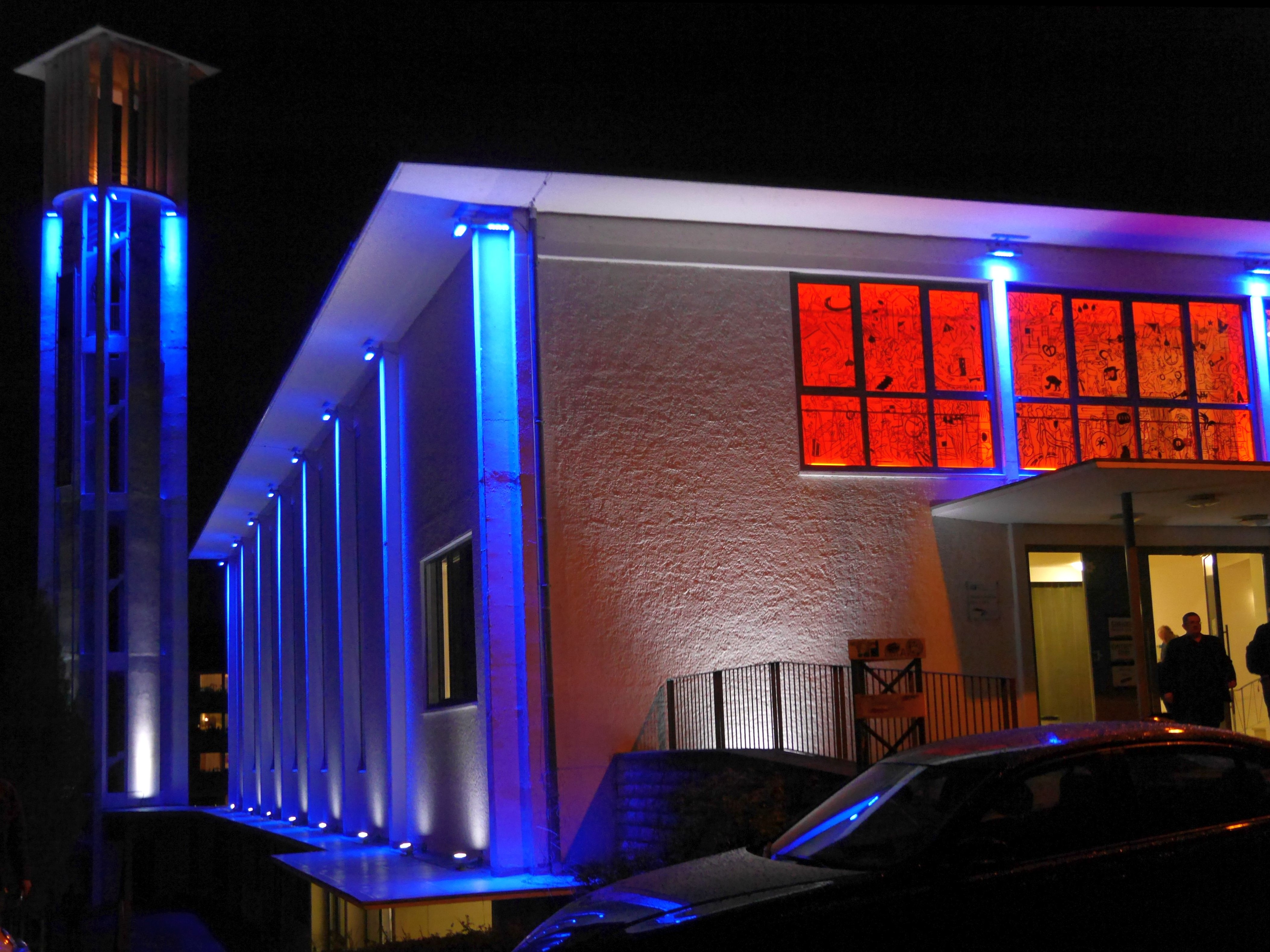 Die Event-Akademie in Baden-Baden, in welcher die Runden 4 bis 7 des Grenke Chess Classic 2017 stattfanden.